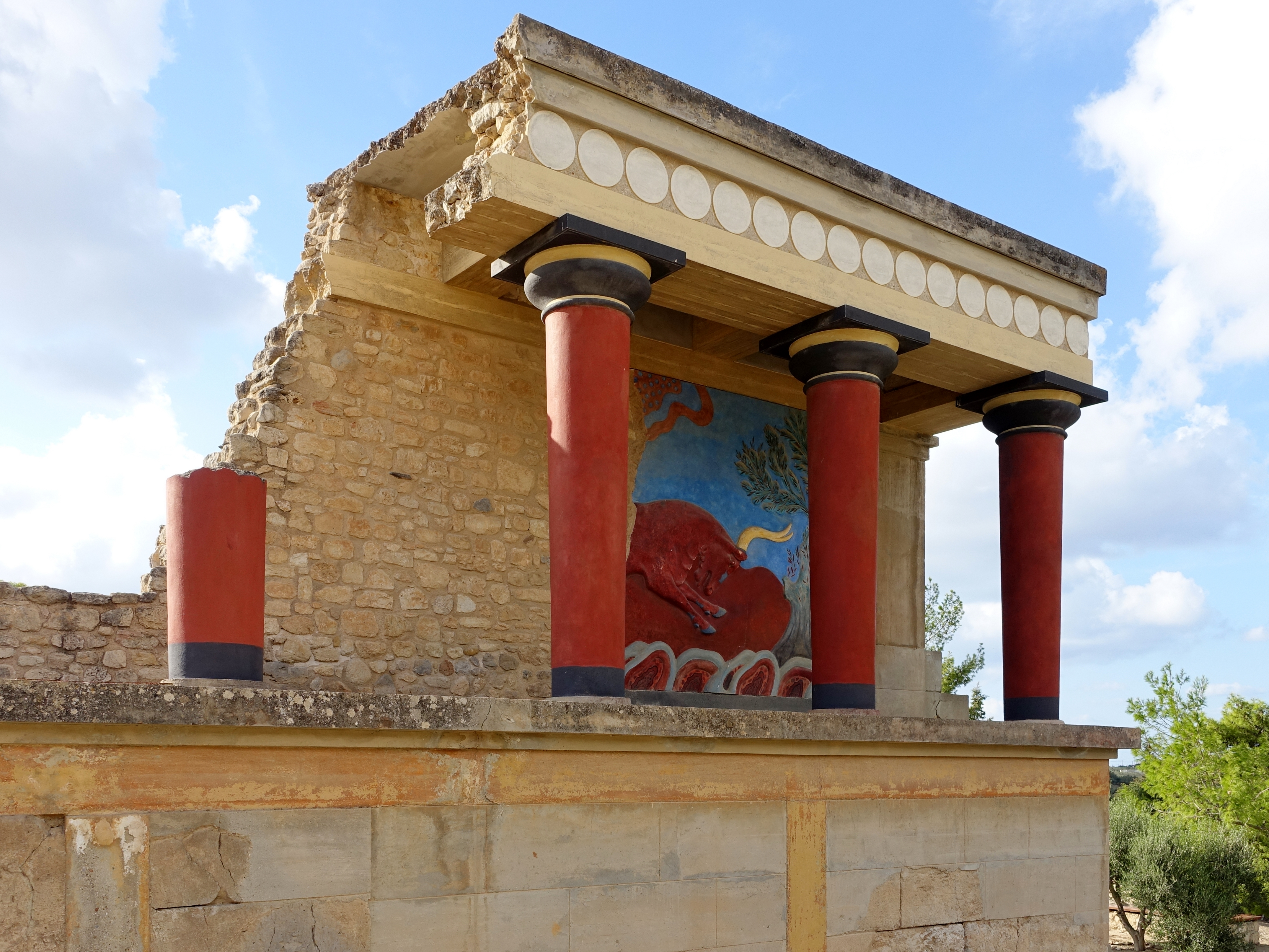 Westbastion mit Relieffresko eines Stieres in einer Ölbaumlandschaft in Knossos (Κνωσός), Kreta, Griechenland